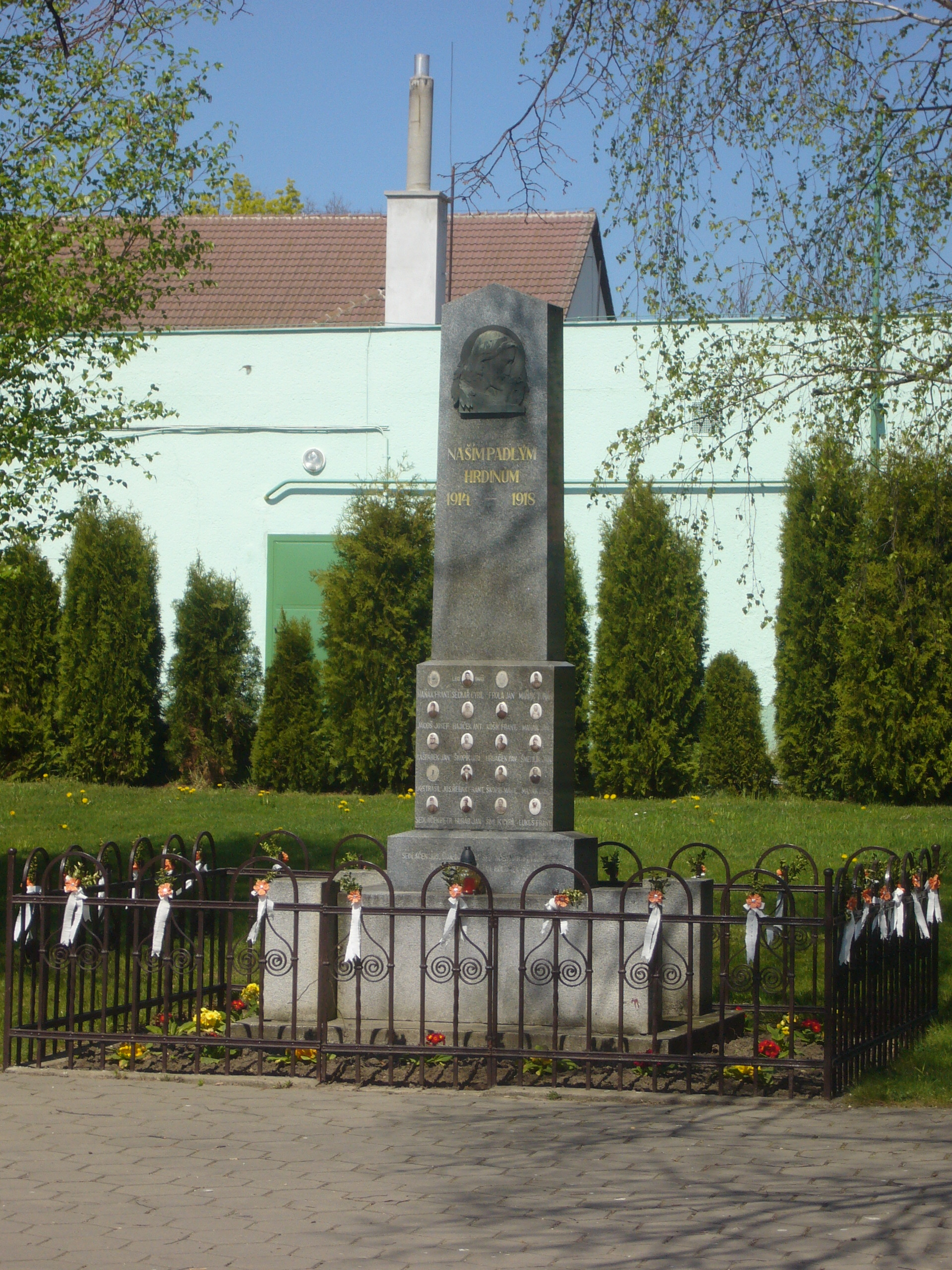 Památník obětem I. světové války, který byl postaven v roce 1933 k uctění památky 22 obětí tohoto konfliktu, které z obce pocházely. Nachází se vedle kapličky a nového kostela.